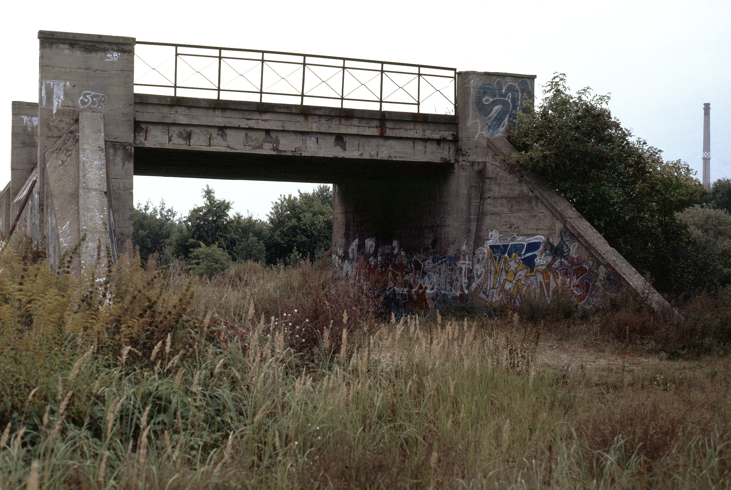 Bahnbrücke Stolpe-Süd, auf der Brücke stand ein Wachturm der Berliner Mauer